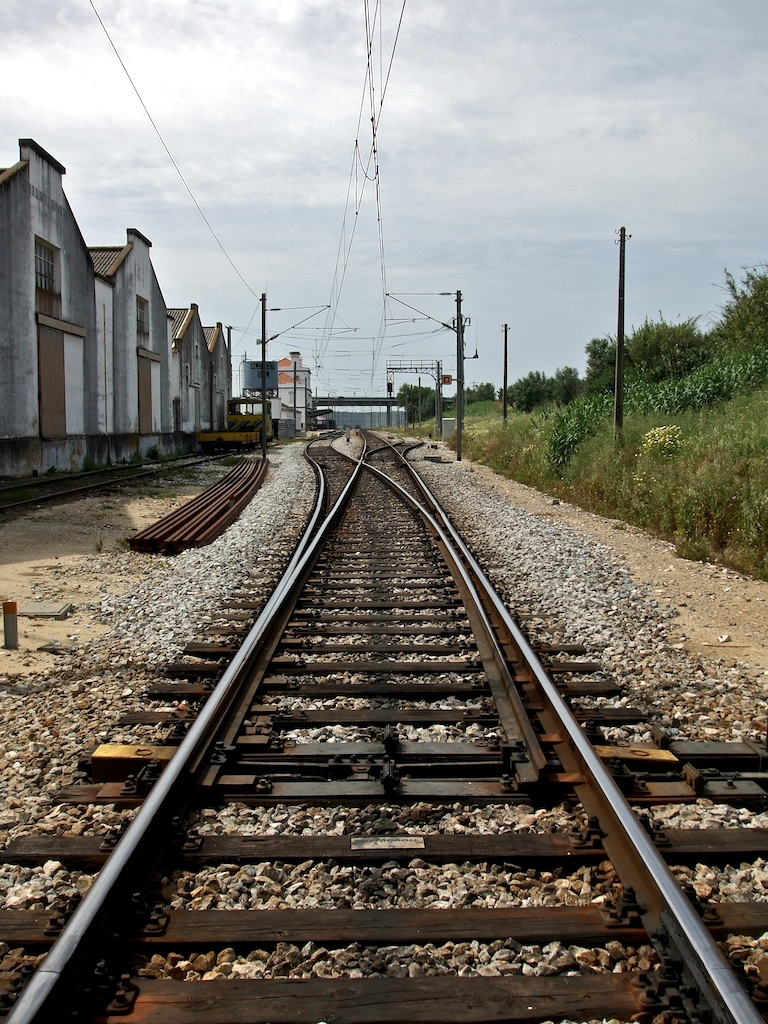 Tipo: EC Estação de Concentração Local: Alcácer do Sal Linha do Sul, PK 78 Data e hora: 3 de Maio de 2008 15h27